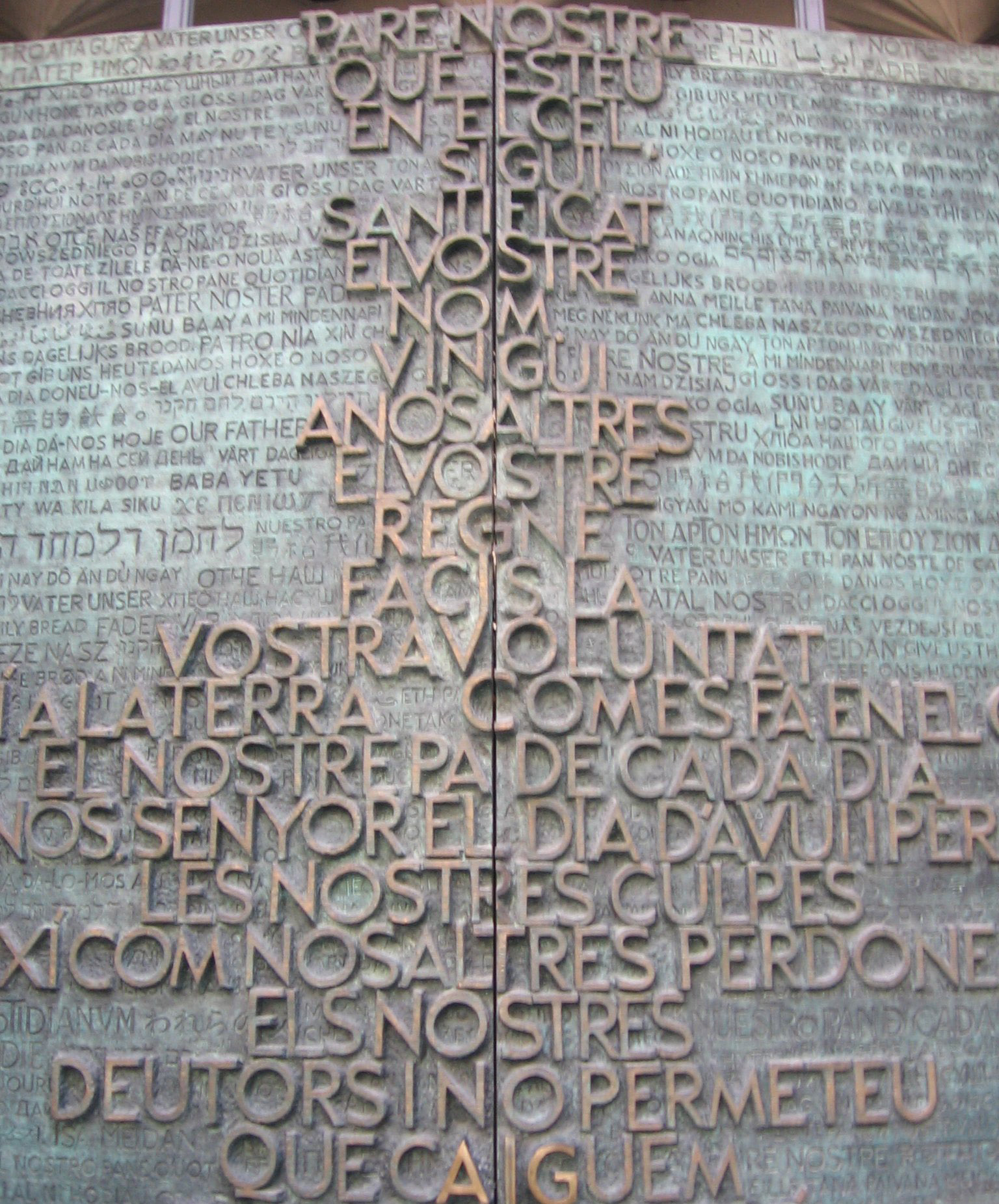 Puerta de la Gloria, Sagrada Familia, de Josep Mª Subirachs.